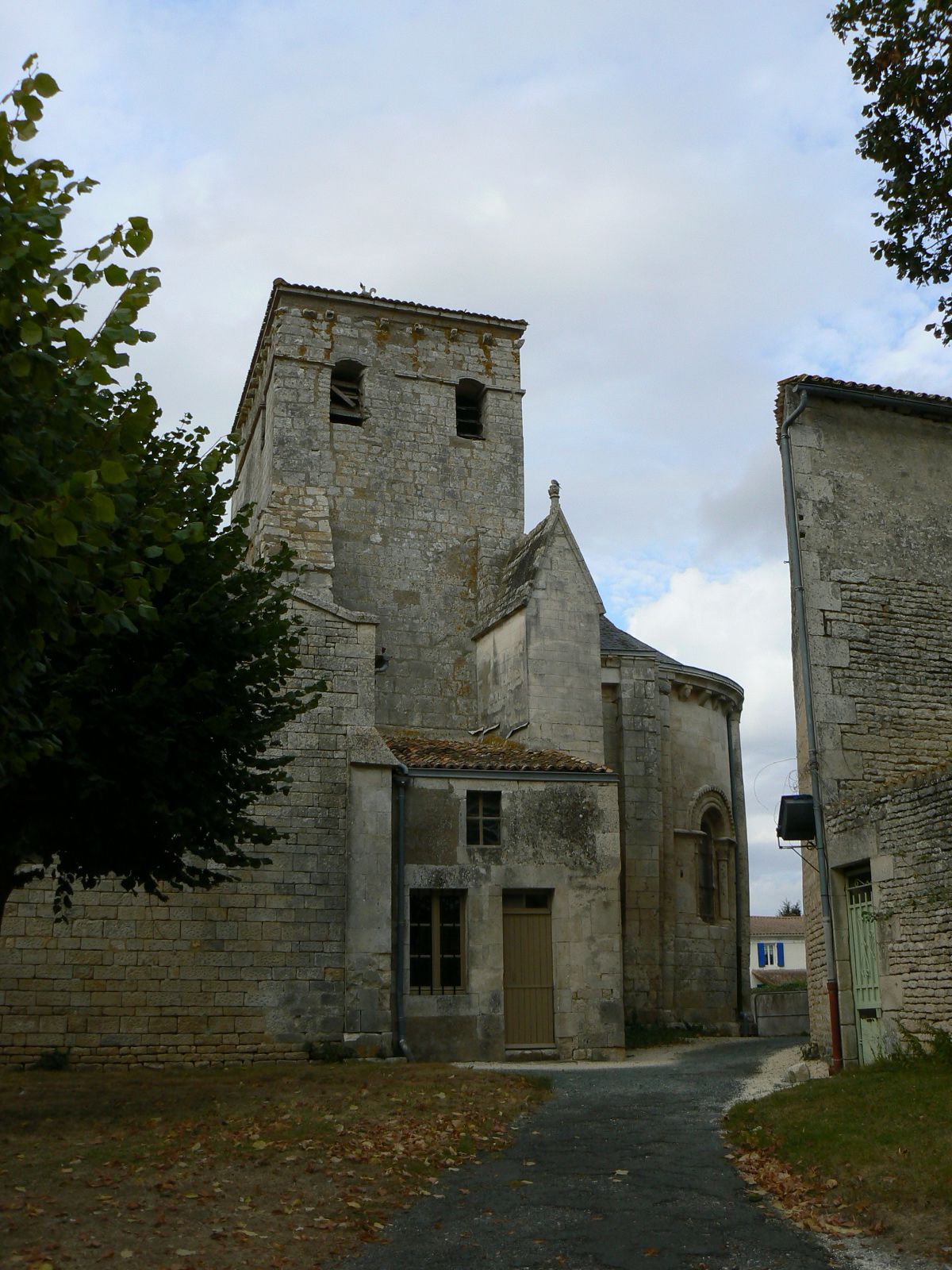 Église Saint-Rémy de Saint-Rémy, (Inscrit, 1929) .